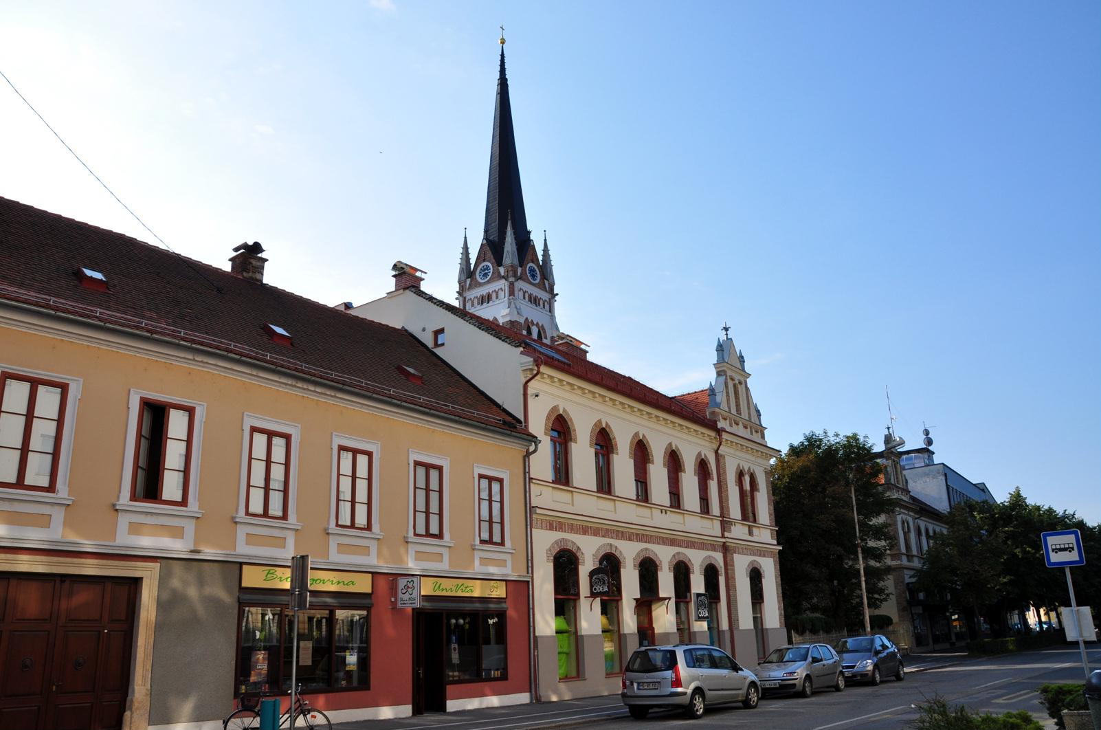 Murska Sobota (19)